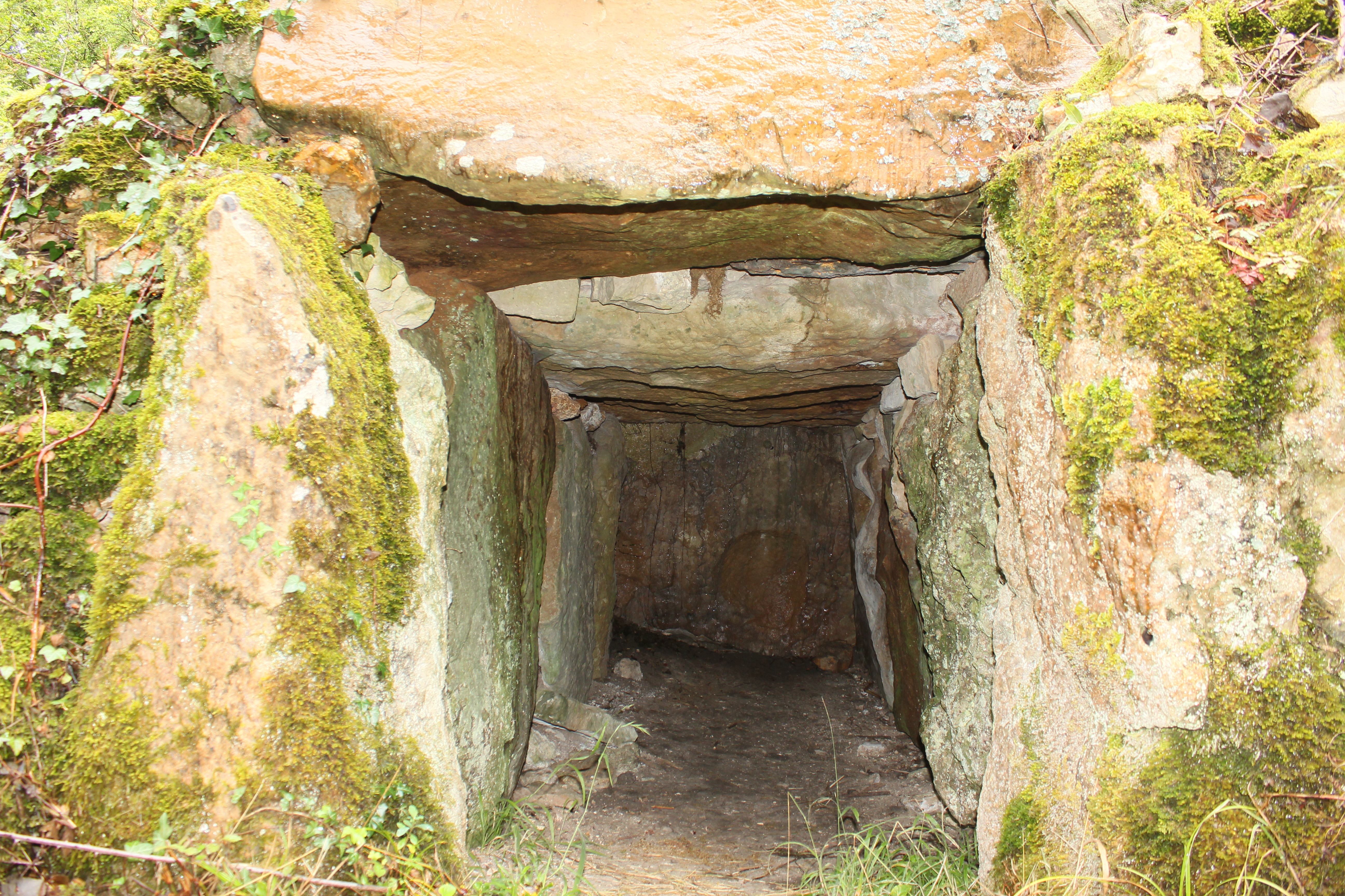 Dolmen du Reclus, (Classé, 1930) .